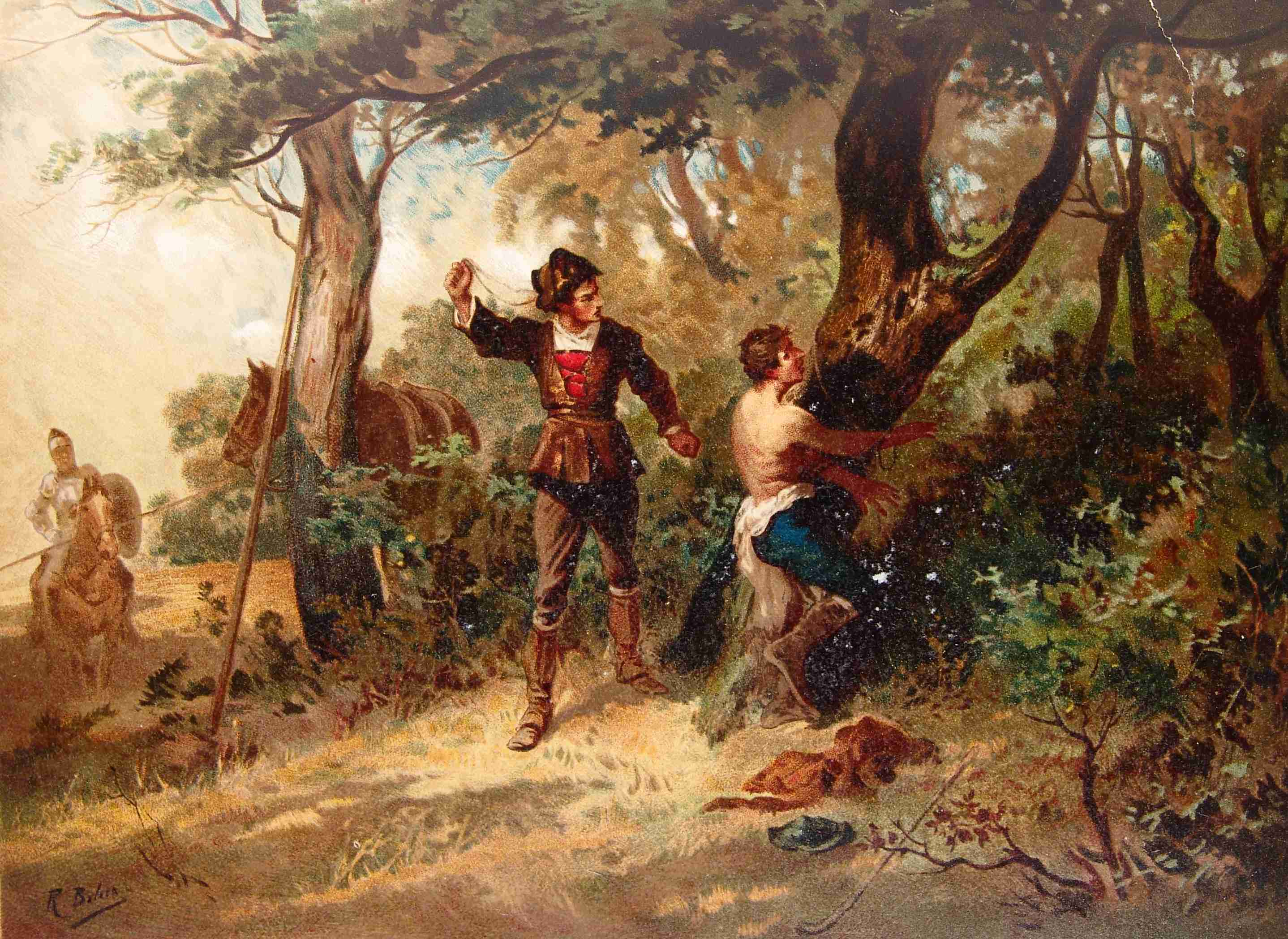 202_013_quijote_cap03